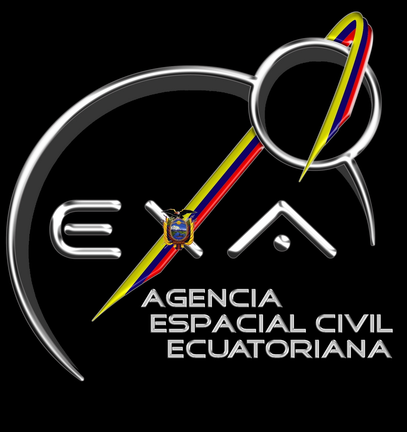 Logo Agencia Espacial Civil Ecuatoriana